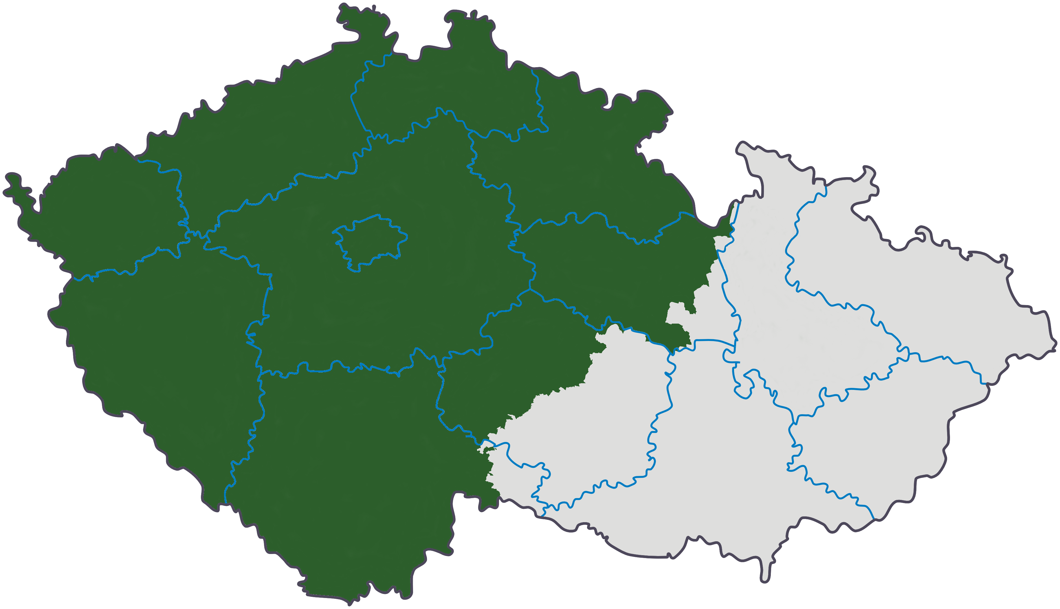 Vytvořeno úpravou mapy Image:Cesko-kraje.svg